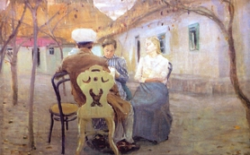 А.К. Шервашидзе (Чачба). В саду